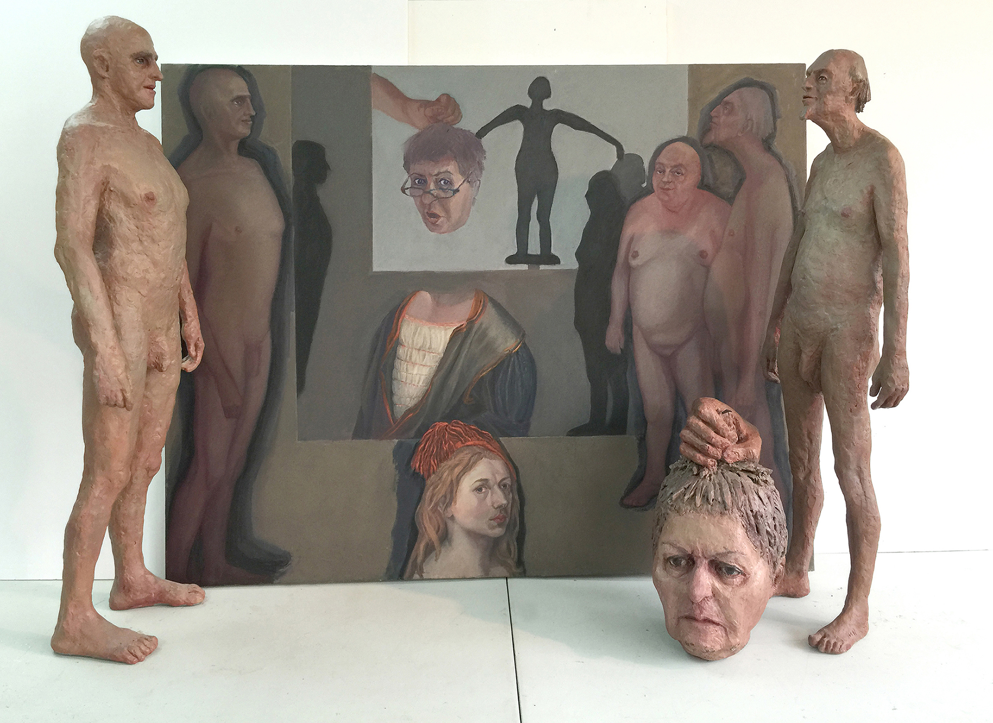 "ההוצאה להורג", שמן על בד ועל פסלי אלומיניום